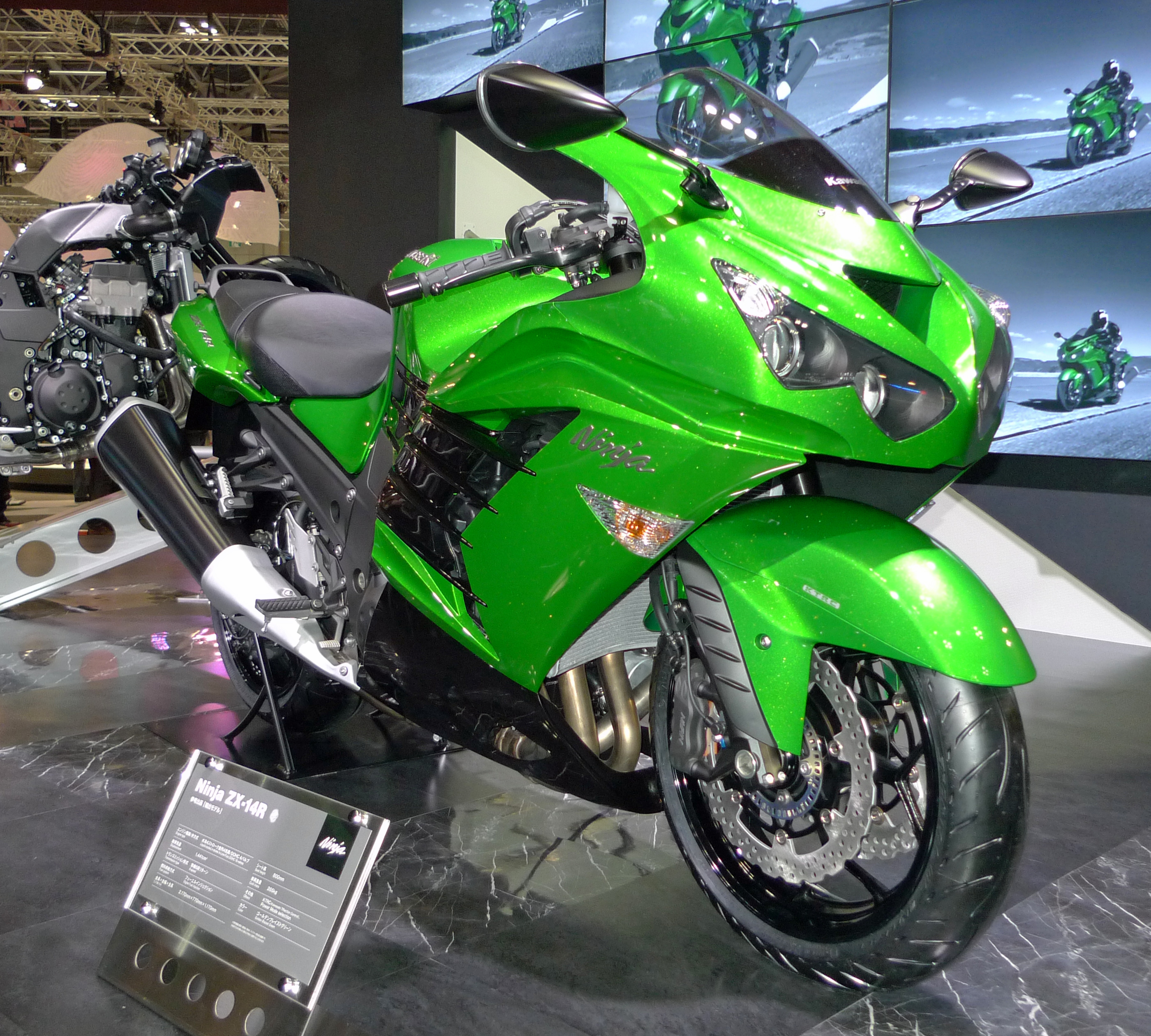 カワサキ・Ninja ZX-14R 2012 東京モーターショー2011にて撮影